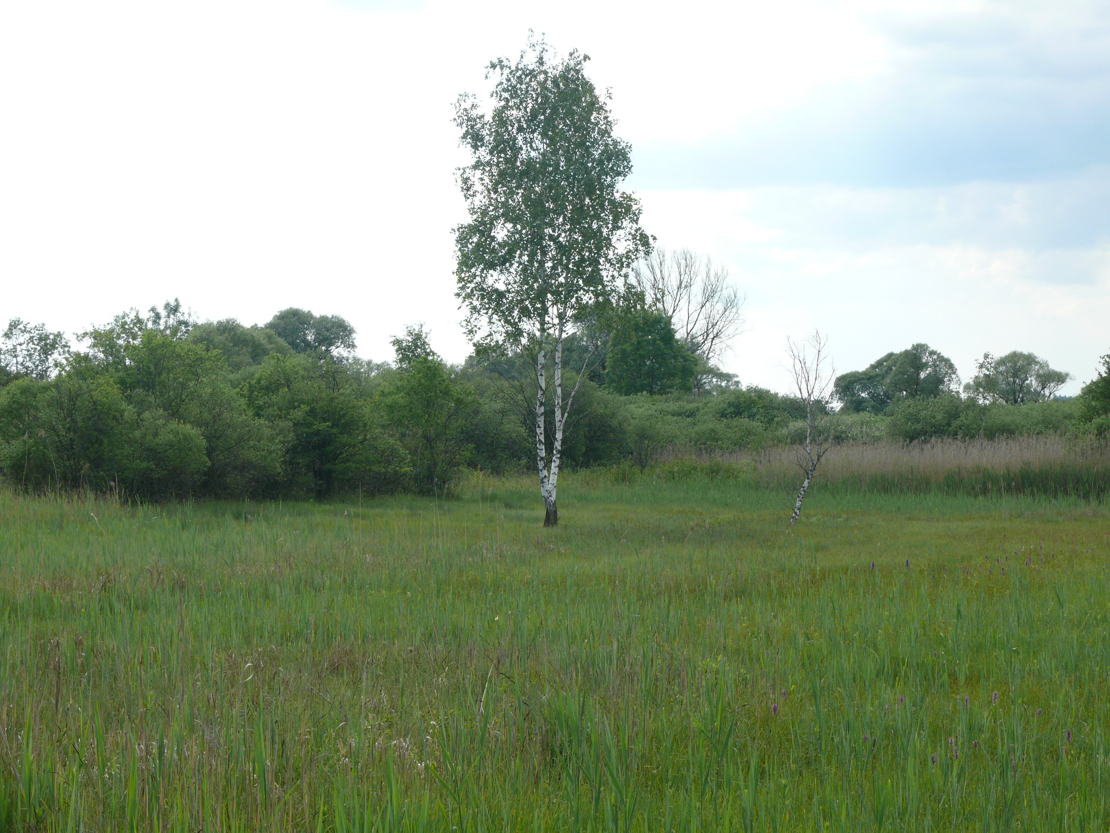 Burger Wiese im Naturschutzgebiet Viehlaßmoos, östlicher Teil zwischen A92 und Sempt-Flutkanal , Landkreis Erding, Bayern, Deutschland